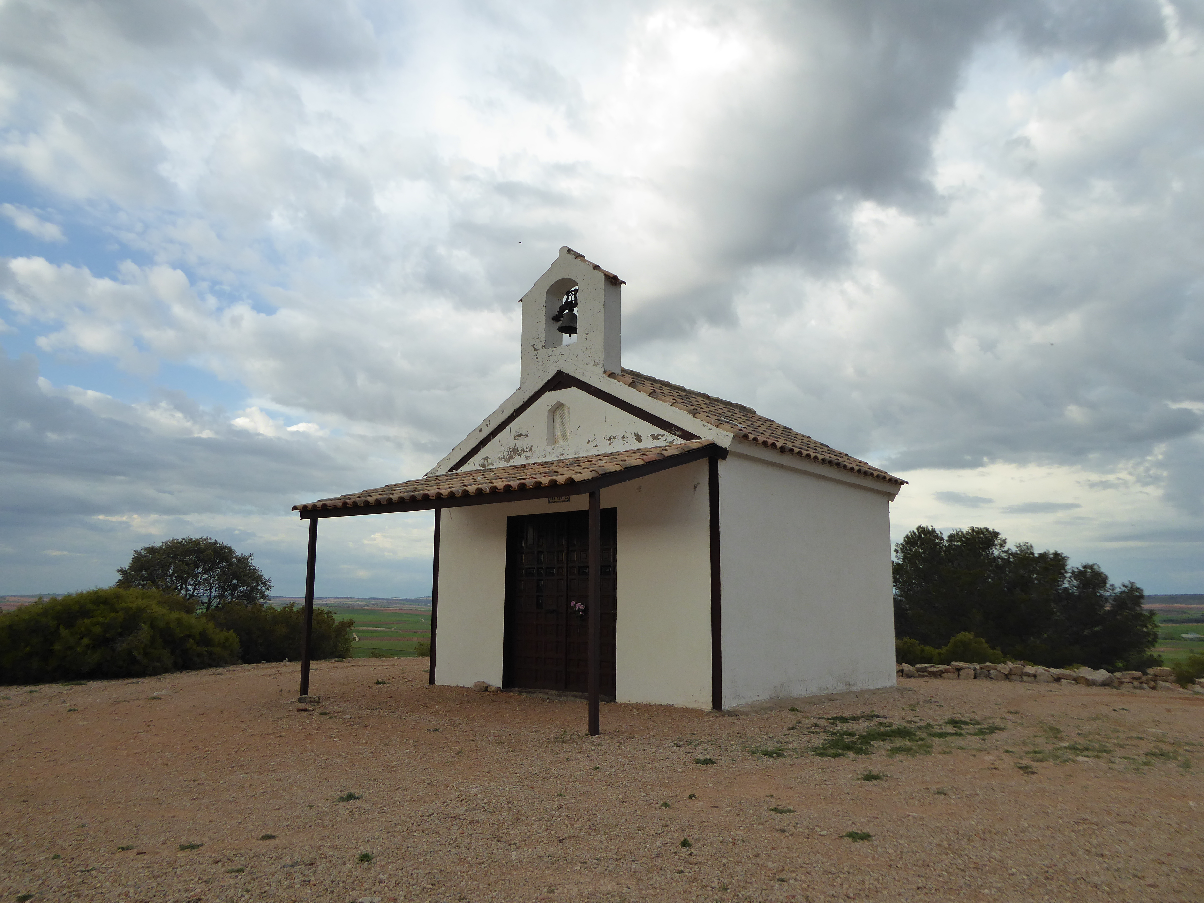 Osa de la Vega